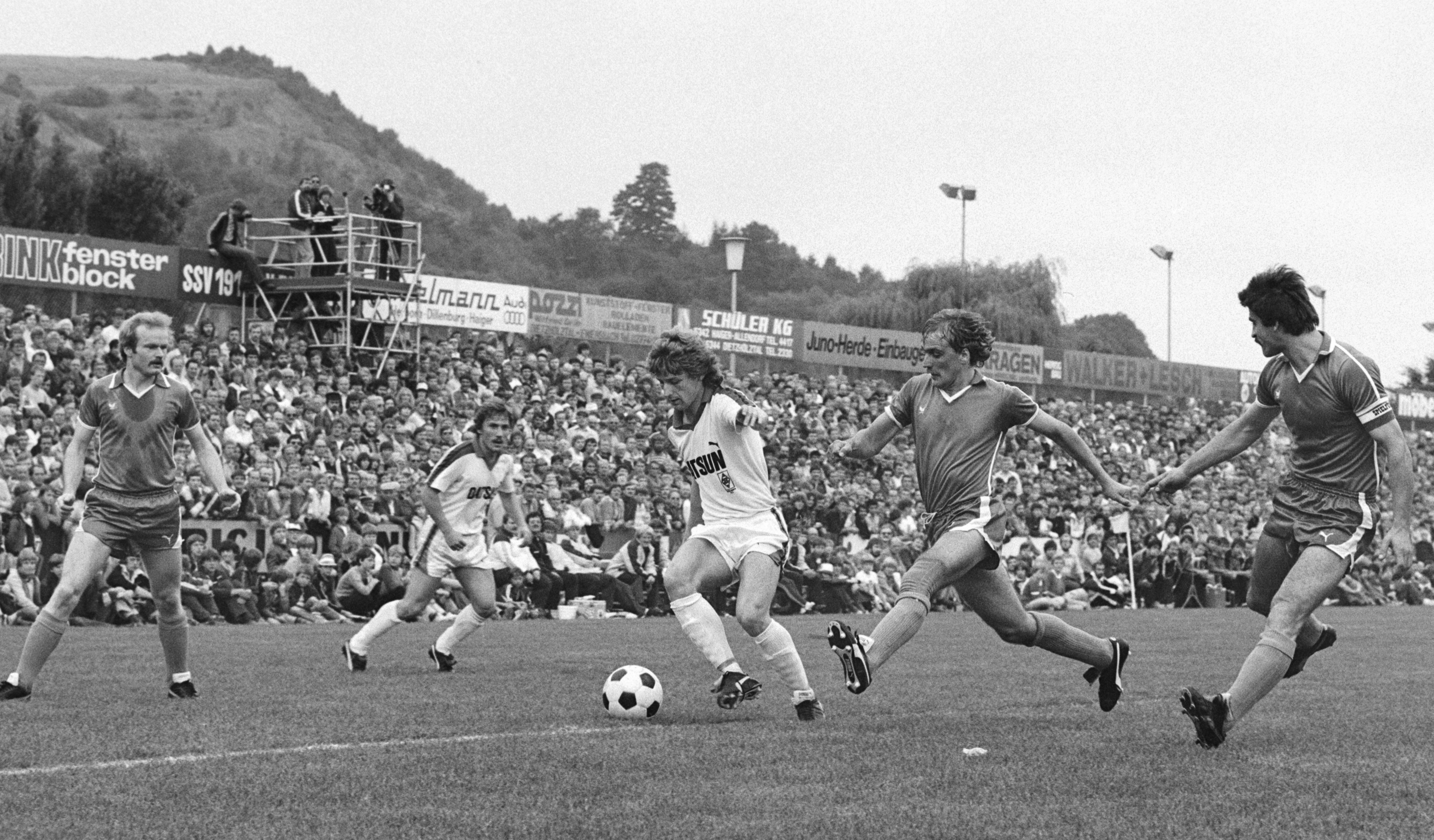 DFB-Pokal 1981: Spielszene aus SSV Dillenburg - Borussia Mönchengladbach (2:7)